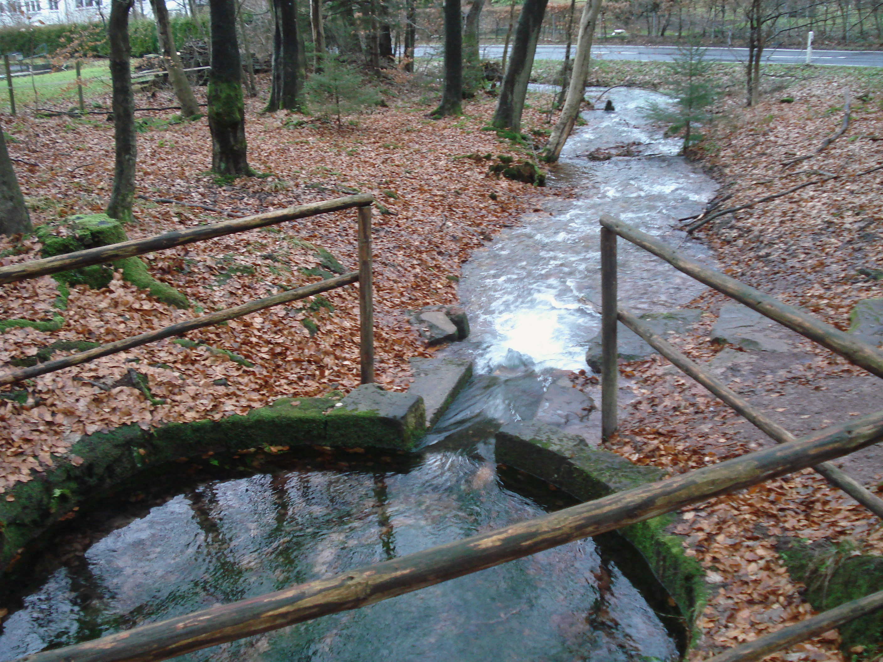 Die linke Quelle der Kahl (Blick in Flussrichtung)